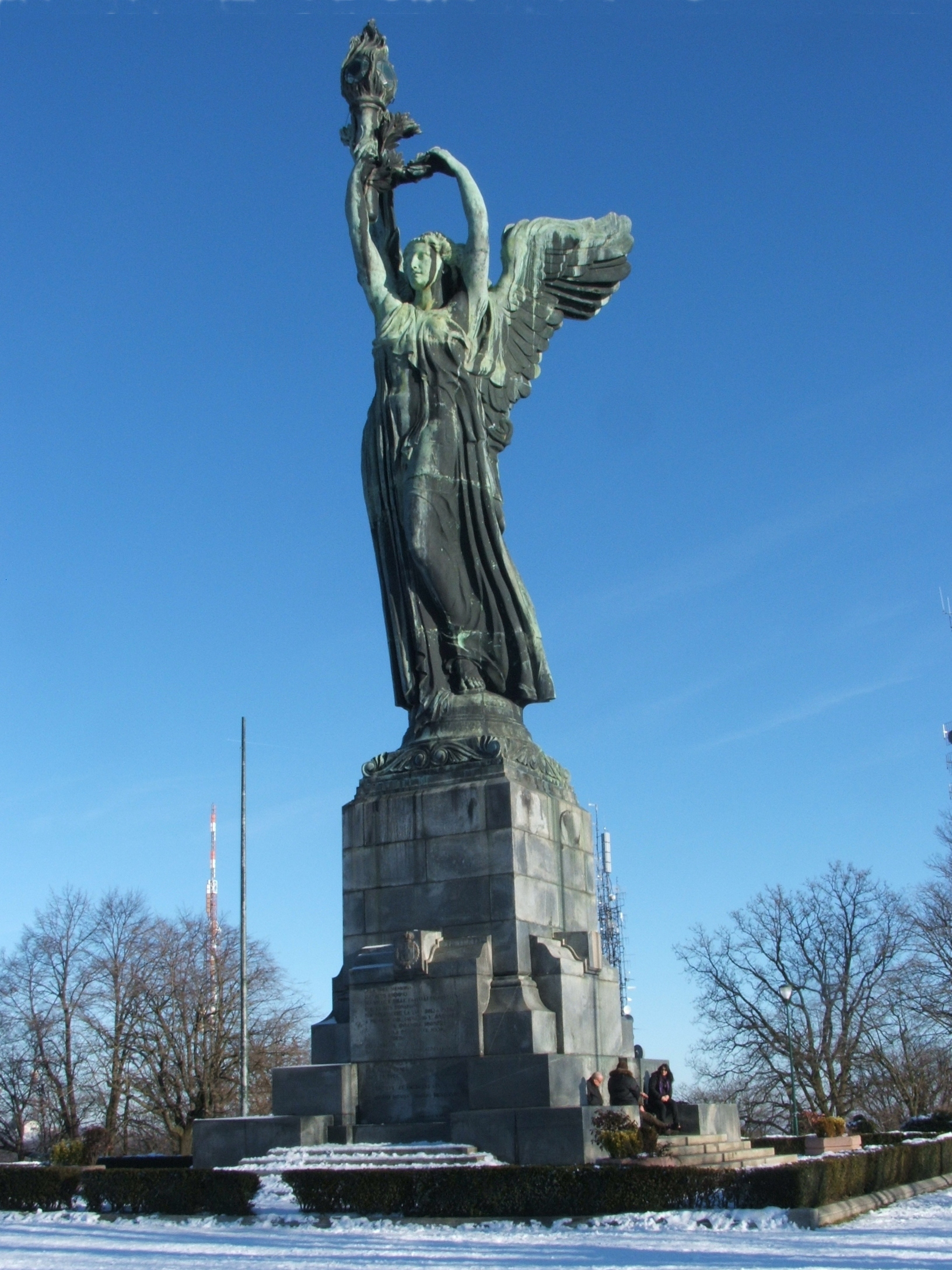 Faro della Vittoria, Torino - Parco della Rimembranza